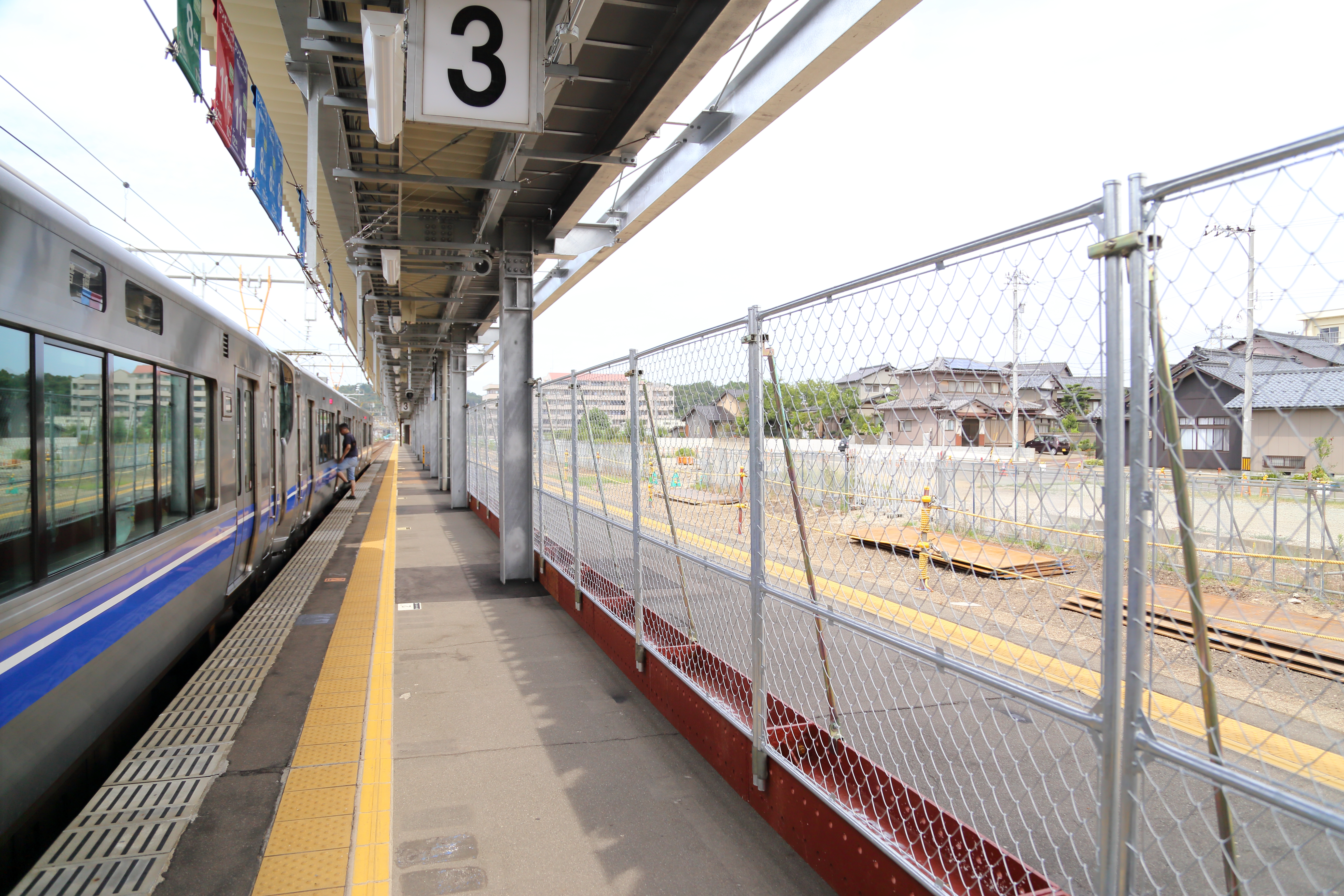 北陸本線芦原温泉駅福井方面ホーム。4番線は撤去され、北陸新幹線の工事が開始されている。